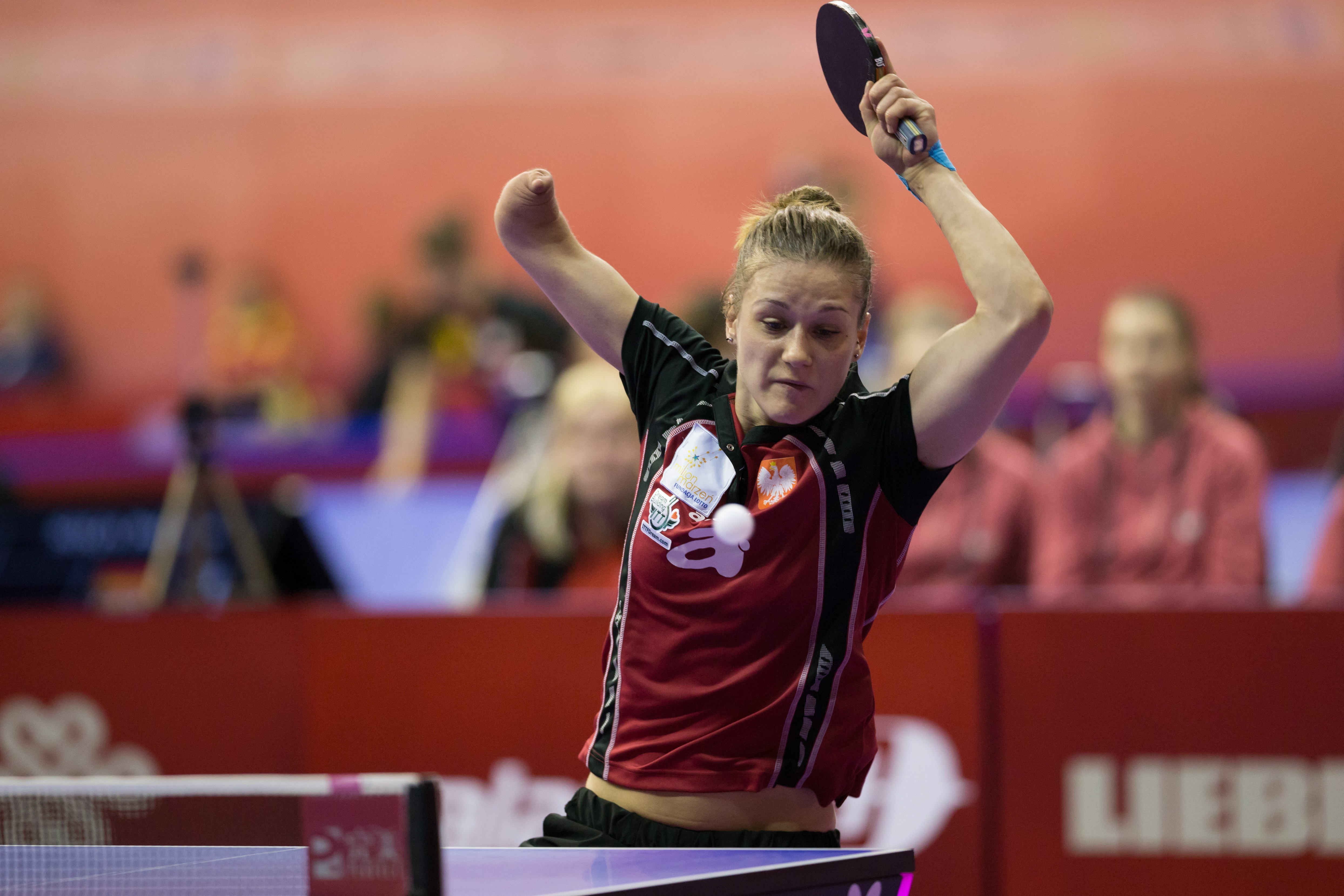 _K0K9036